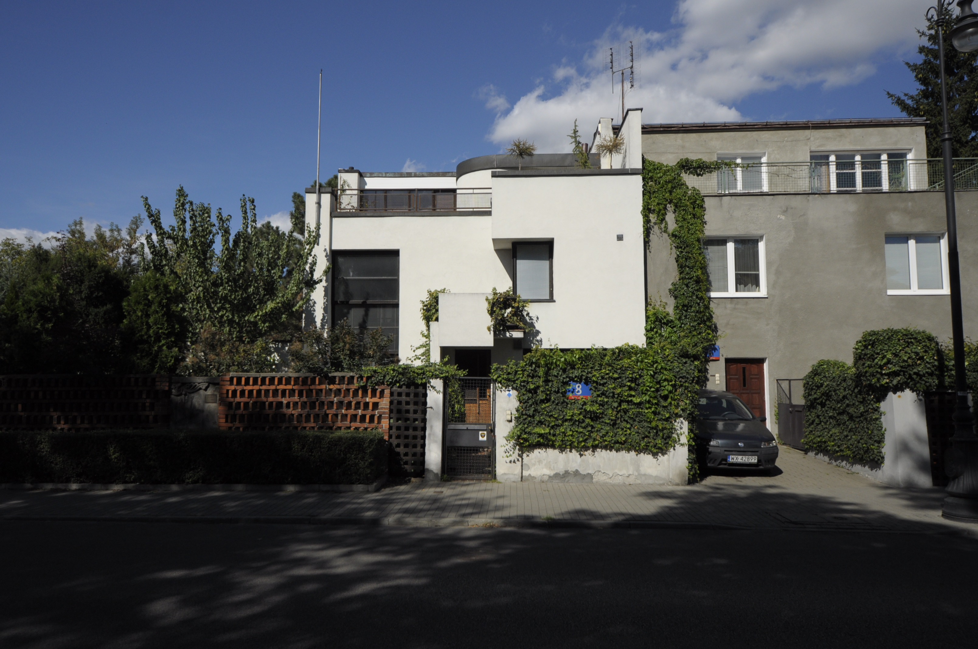 Dom własny, architekt Stanisław Brukalski, modernizm. willa,1927-28 ogród ul. Niegolewskiego 8, Warszawa, dz. Żoliborz, Polska 04.1973.